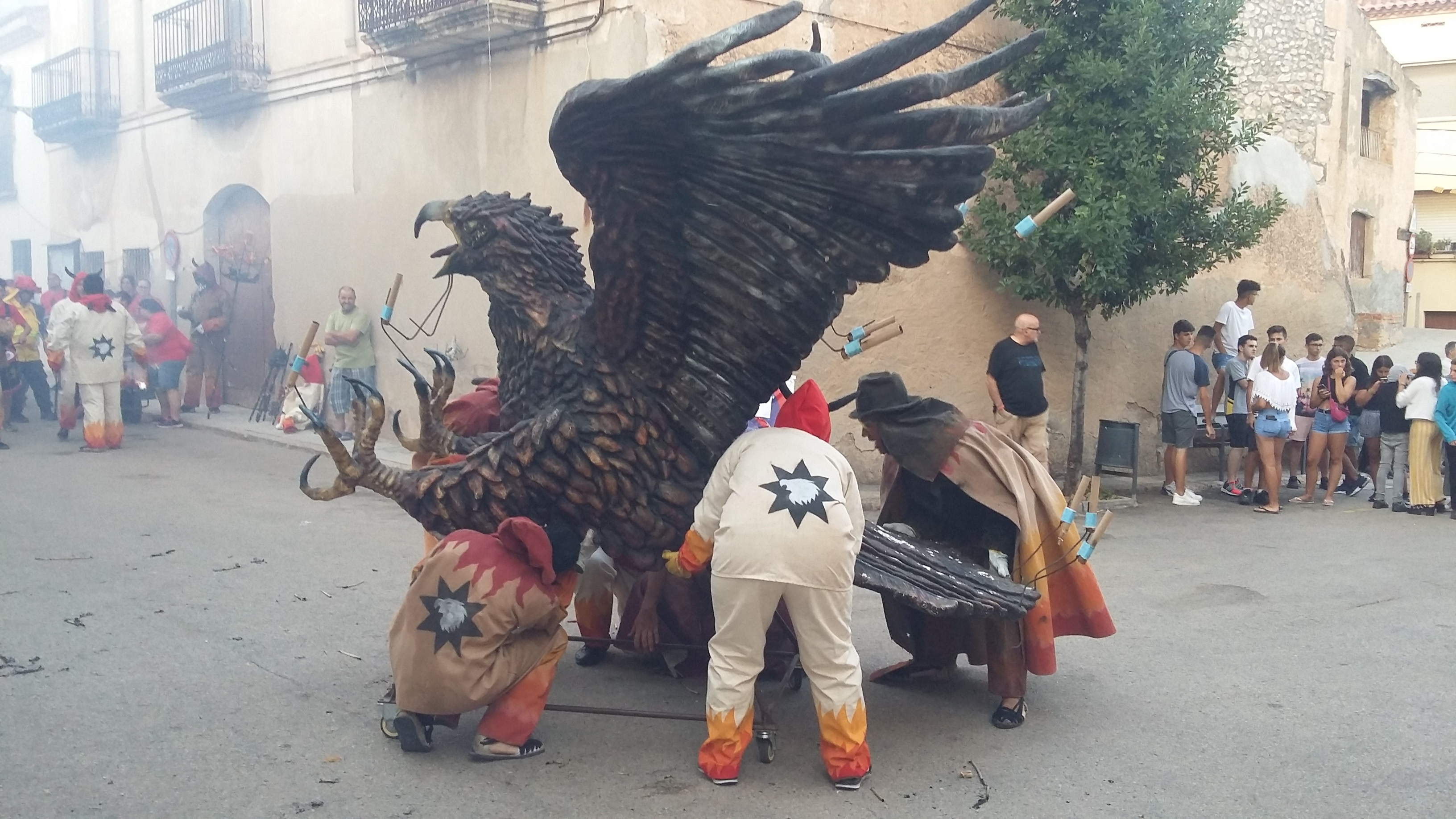 Bestia de Foc. Aguilots de Bonastre